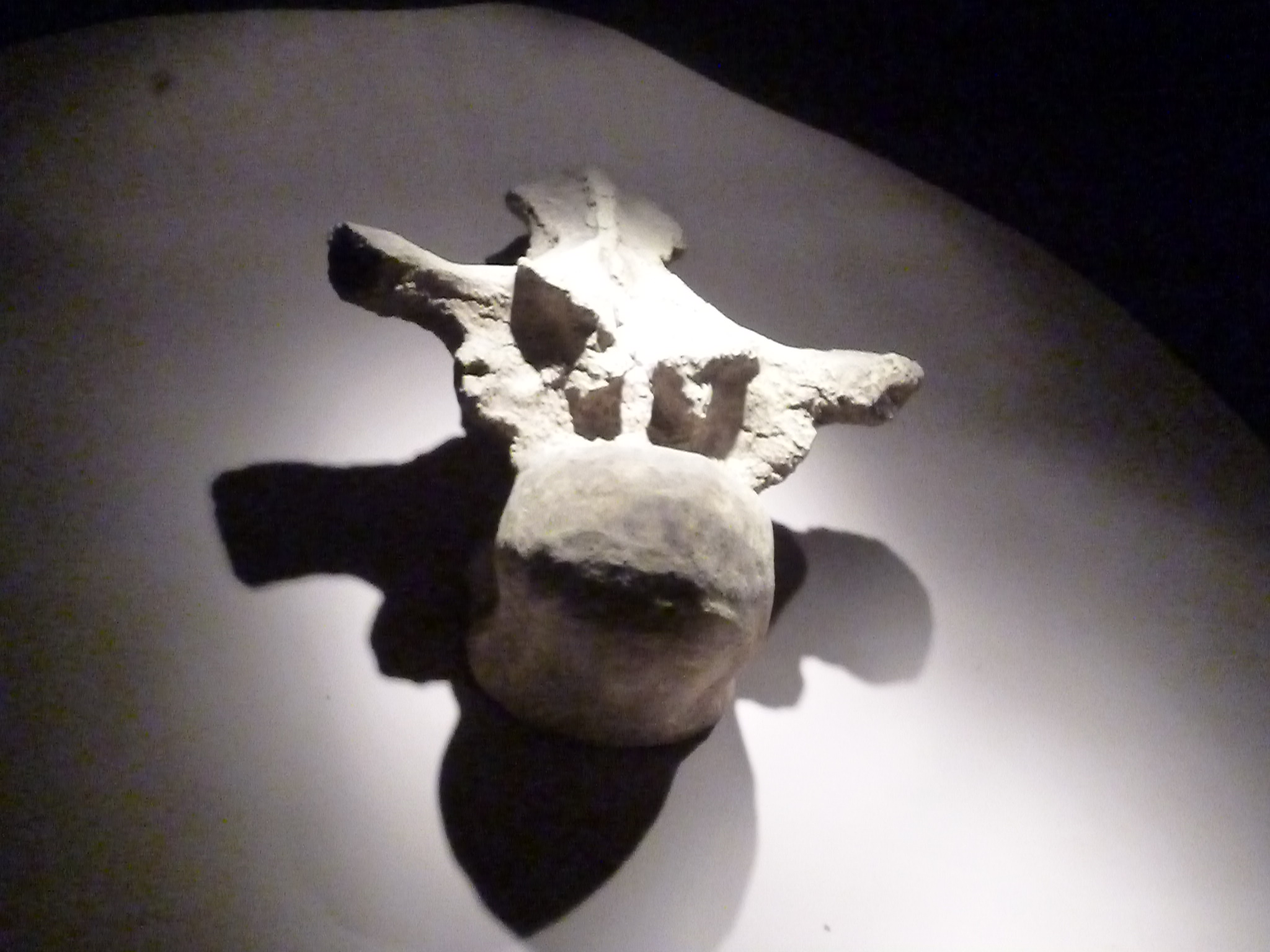 Vértebra del Argentinosaurus en el MEF de Trelew